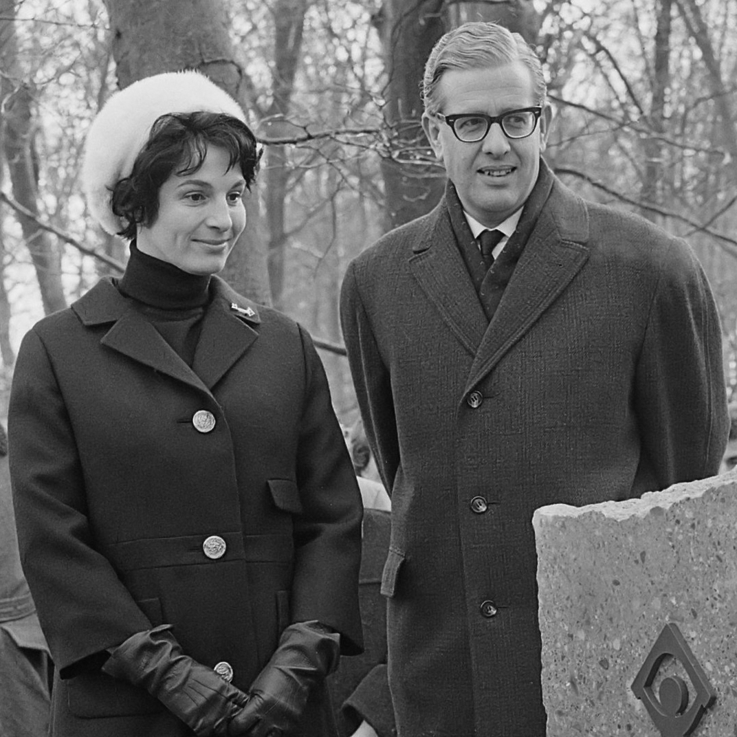 Eerste steen voor "Het Dorp", Mies Bouwman en dr. Klapwijk de eerste steen onthuld 28 januari 1963